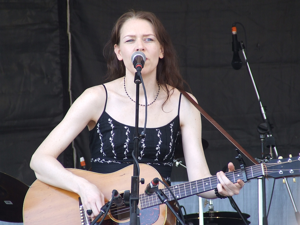 Gillian Welch, Jazz Fest, New Orleans